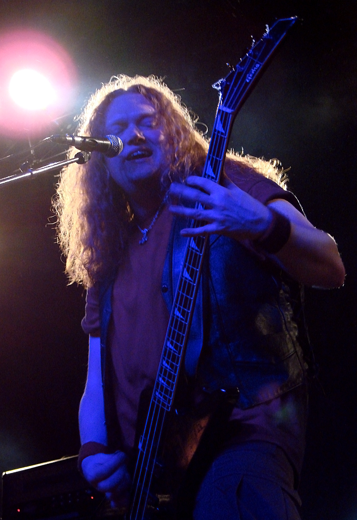 Unleashed en concert à l'Elysée-Monmartre, Paris, le 2/12/2007.